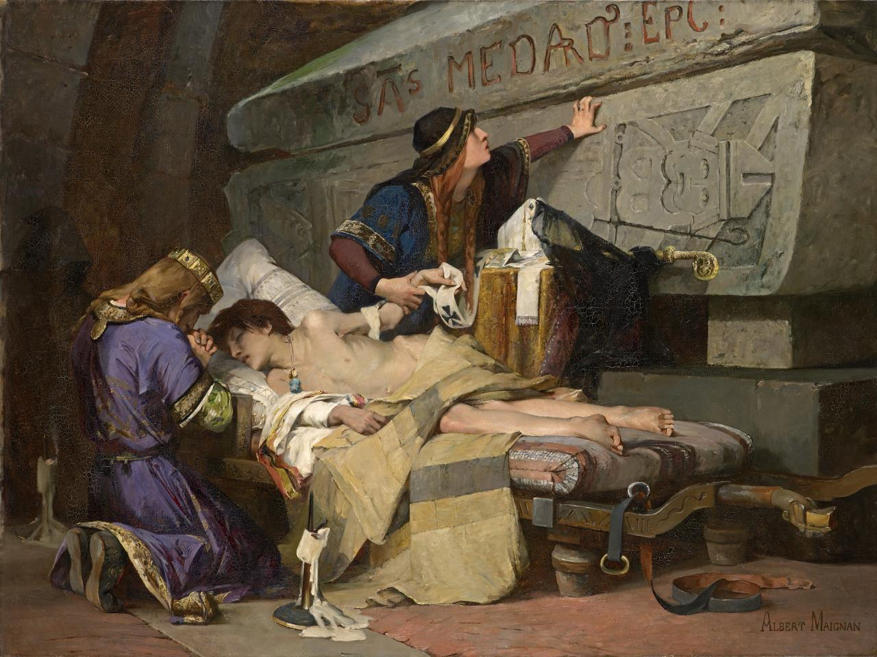 Les derniers moments de Chlodobert, huile sur toile d'Albert Maignan, 1880, National Gallery of Victoria.